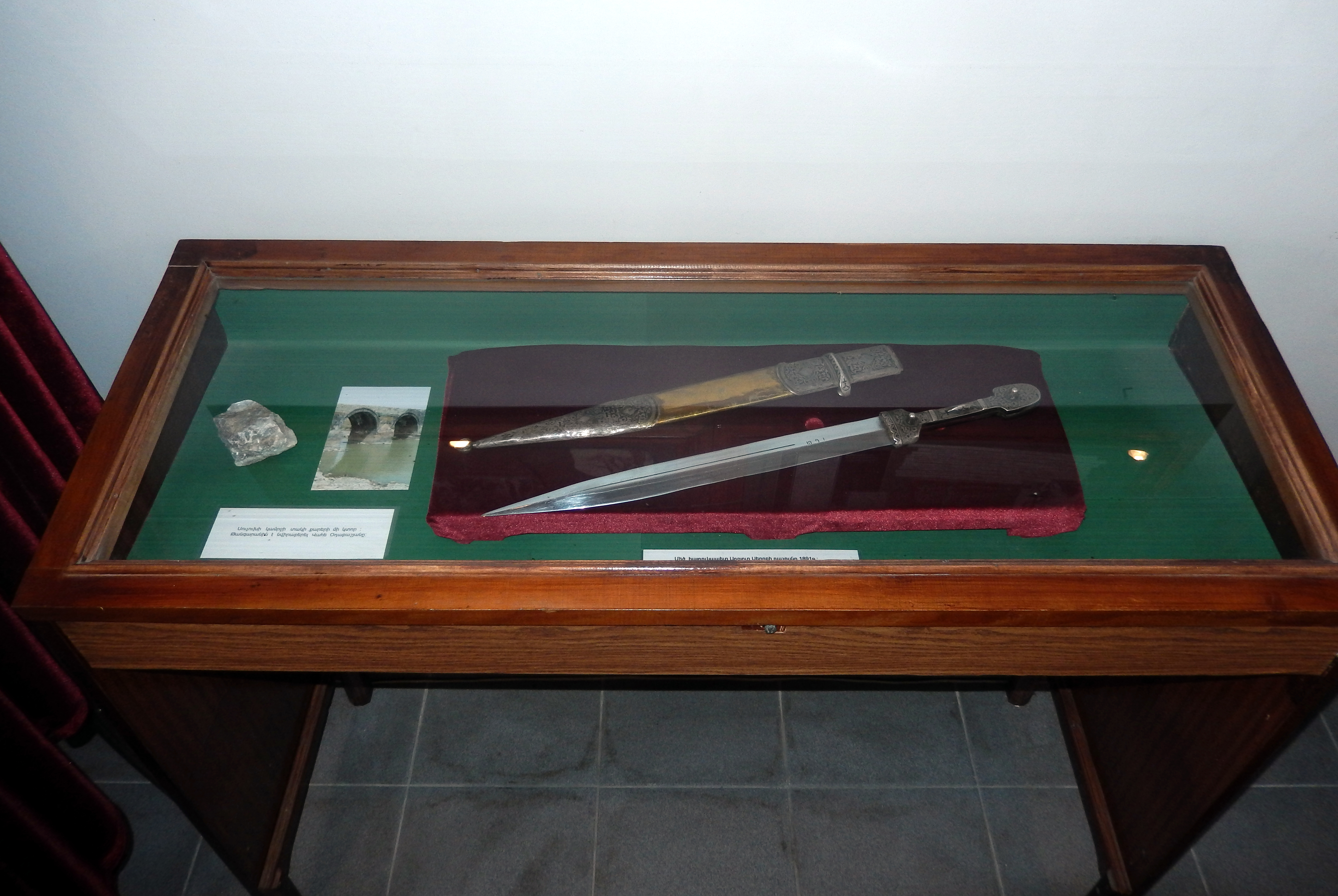 Ֆիդայական շարժման «Զորավար Անդրանիկ» թանգարան